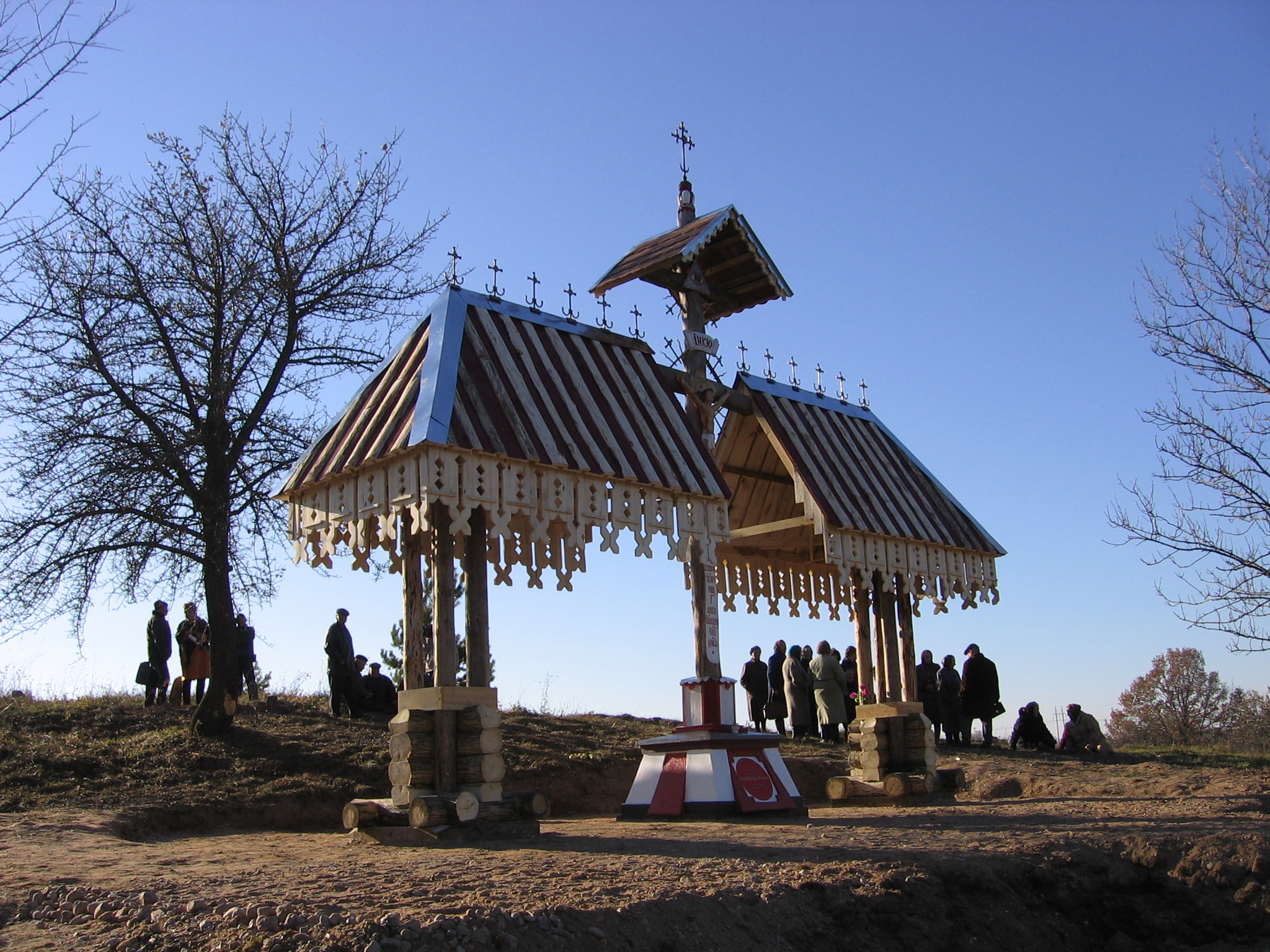 Памятны знак жаўнерам-суайчыннікам, палеглым у 1920 годзе ў гарадскім пасёлку Лынтупах (2008)